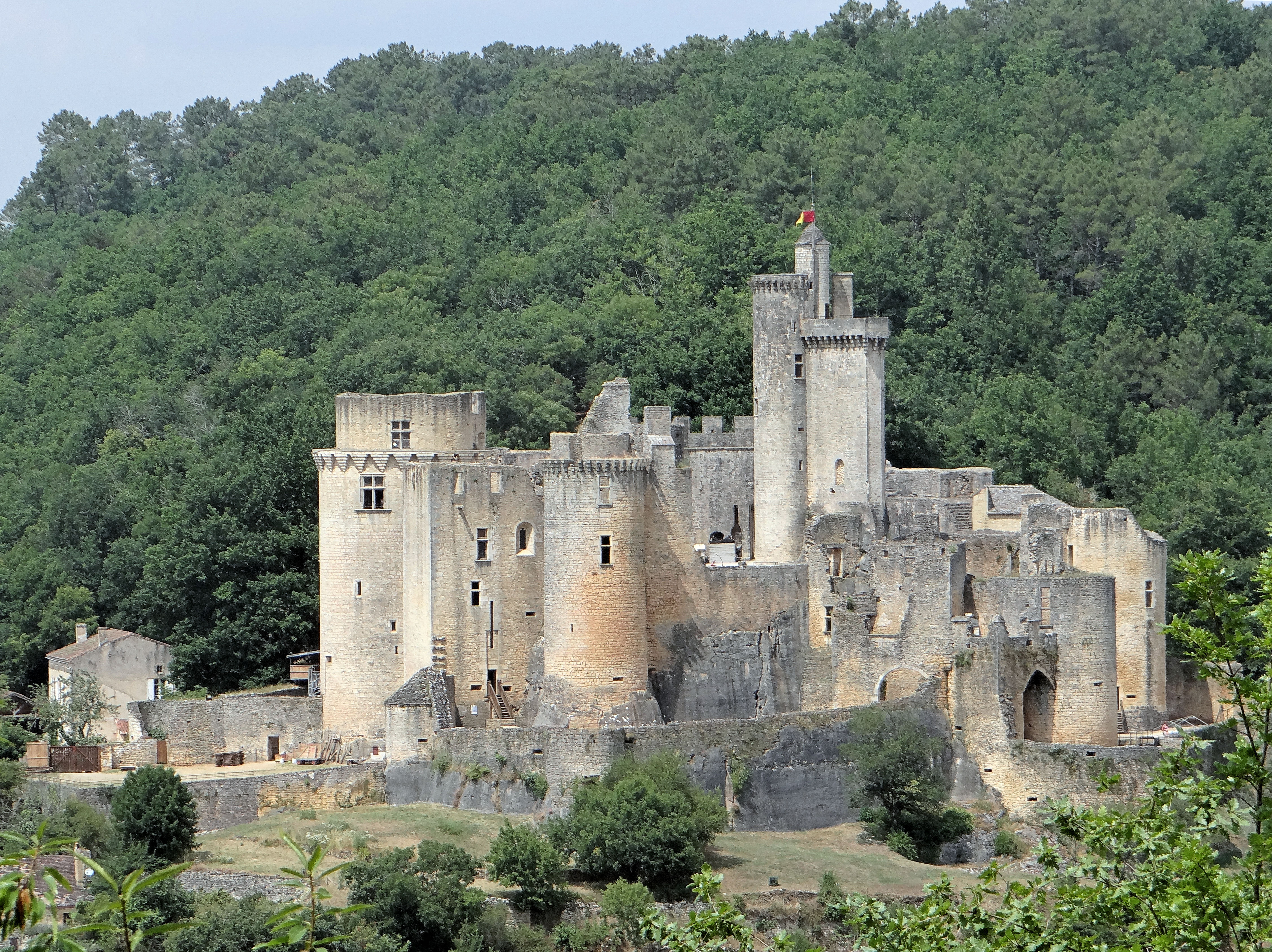 Saint-Front-sur-Lémance - Château de Bonaguil - Vue d'ensemble .